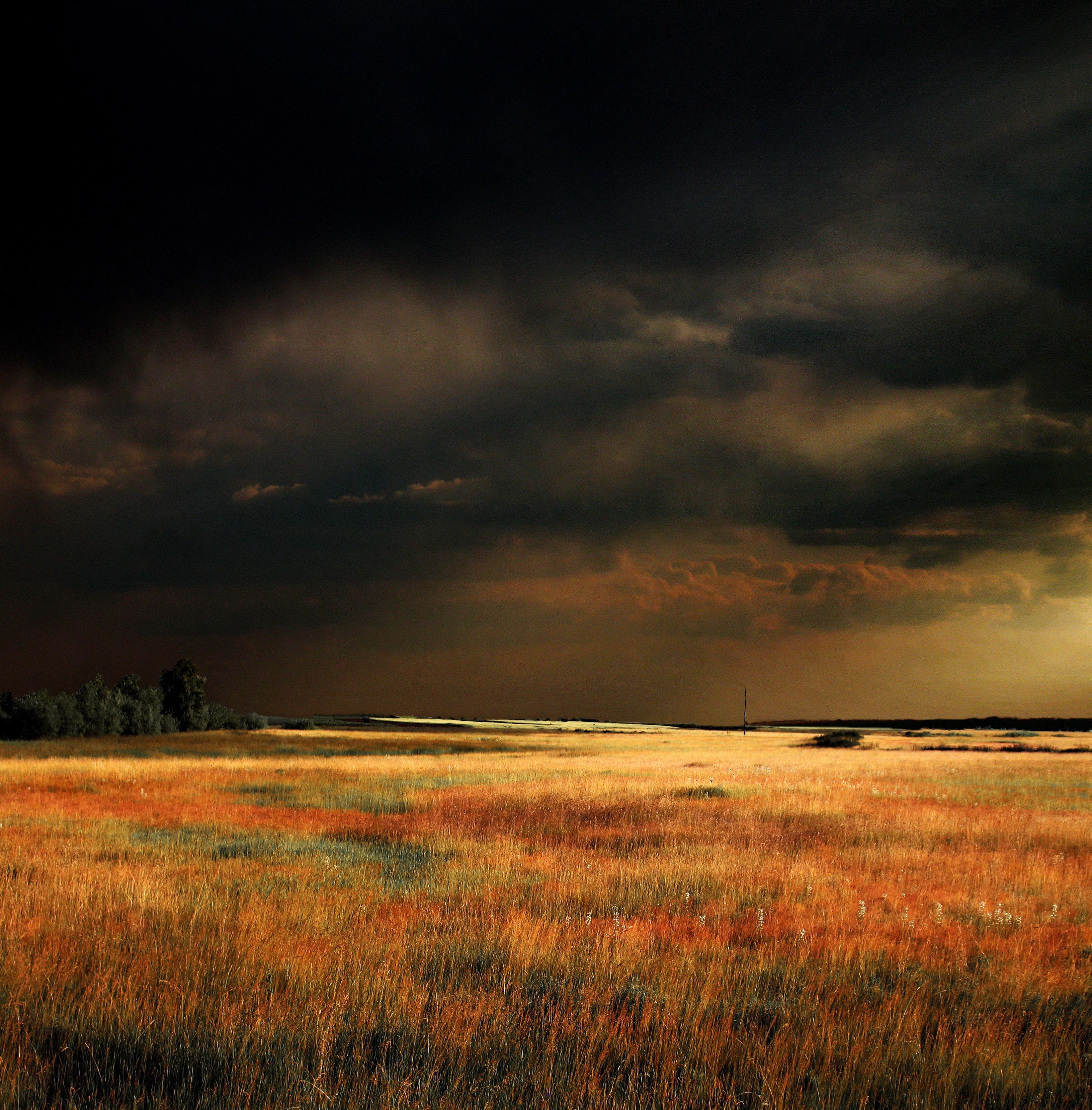 Srpskohrvatski / српскохрватски: OKOLINA SPECIJALNOG REZERVATA PRIRODE CARSKA BARA